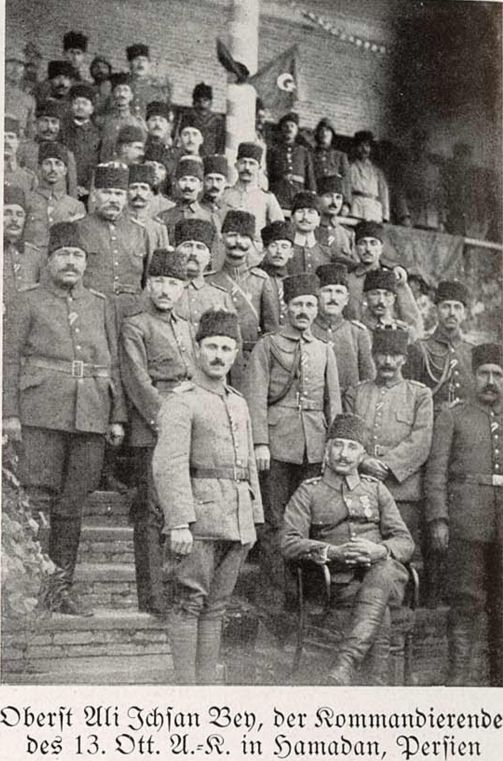 Die Kaukasusfront